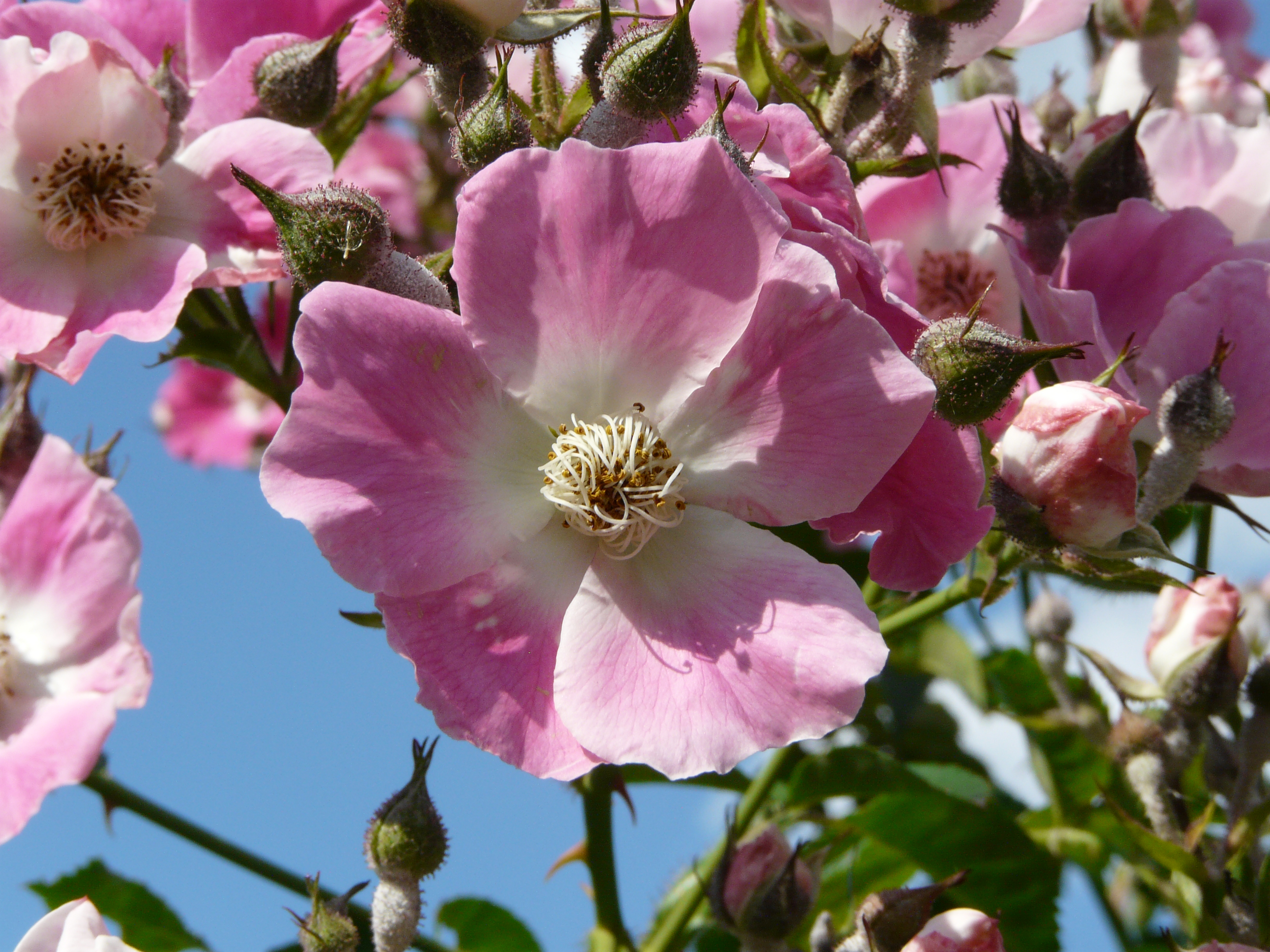 Rosa majalis